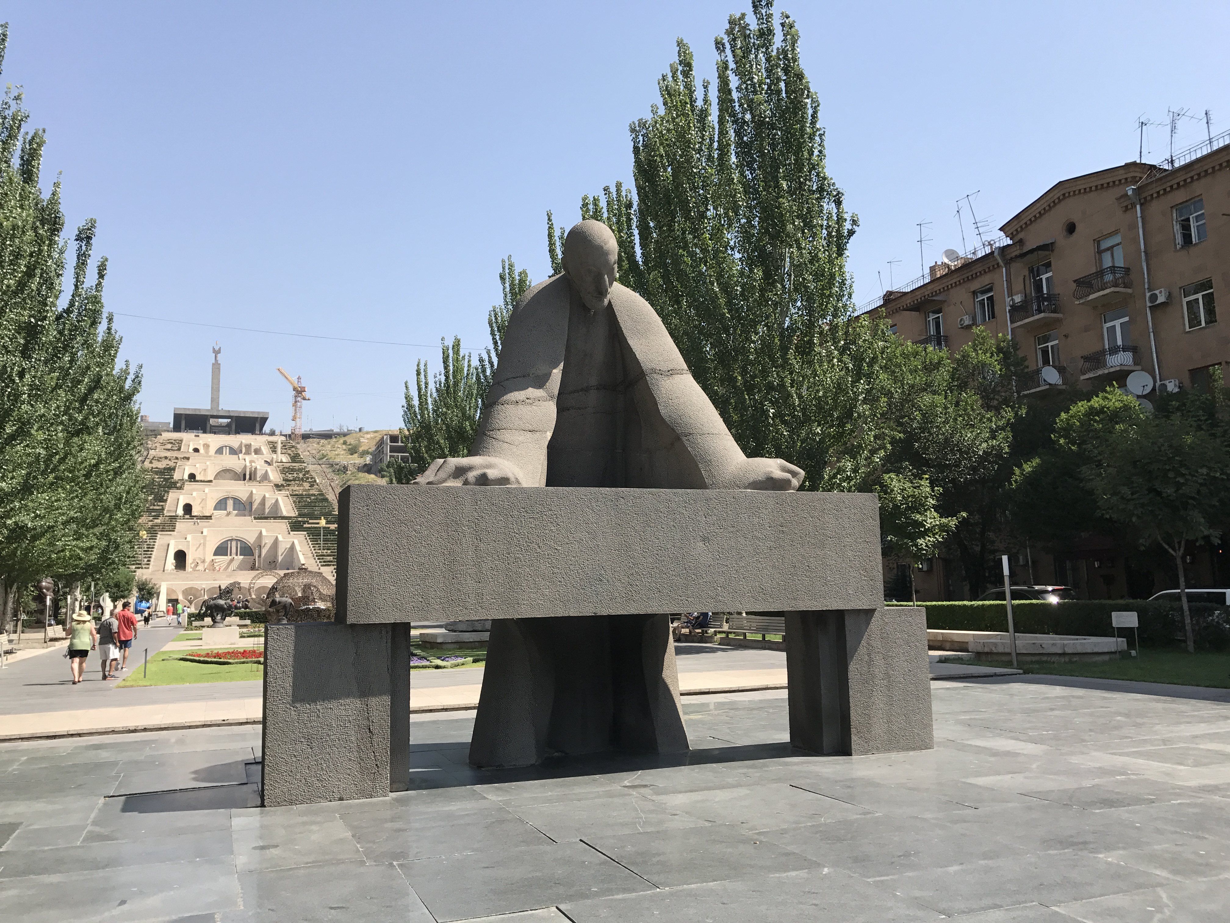 Art public, rue Tamanian, Erevan, 2017.